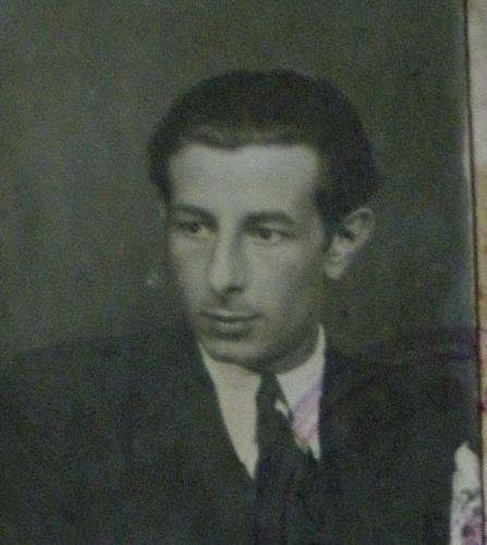 Rafael Miguel Sánchez Músico Argentino de Tango (1907-1986)